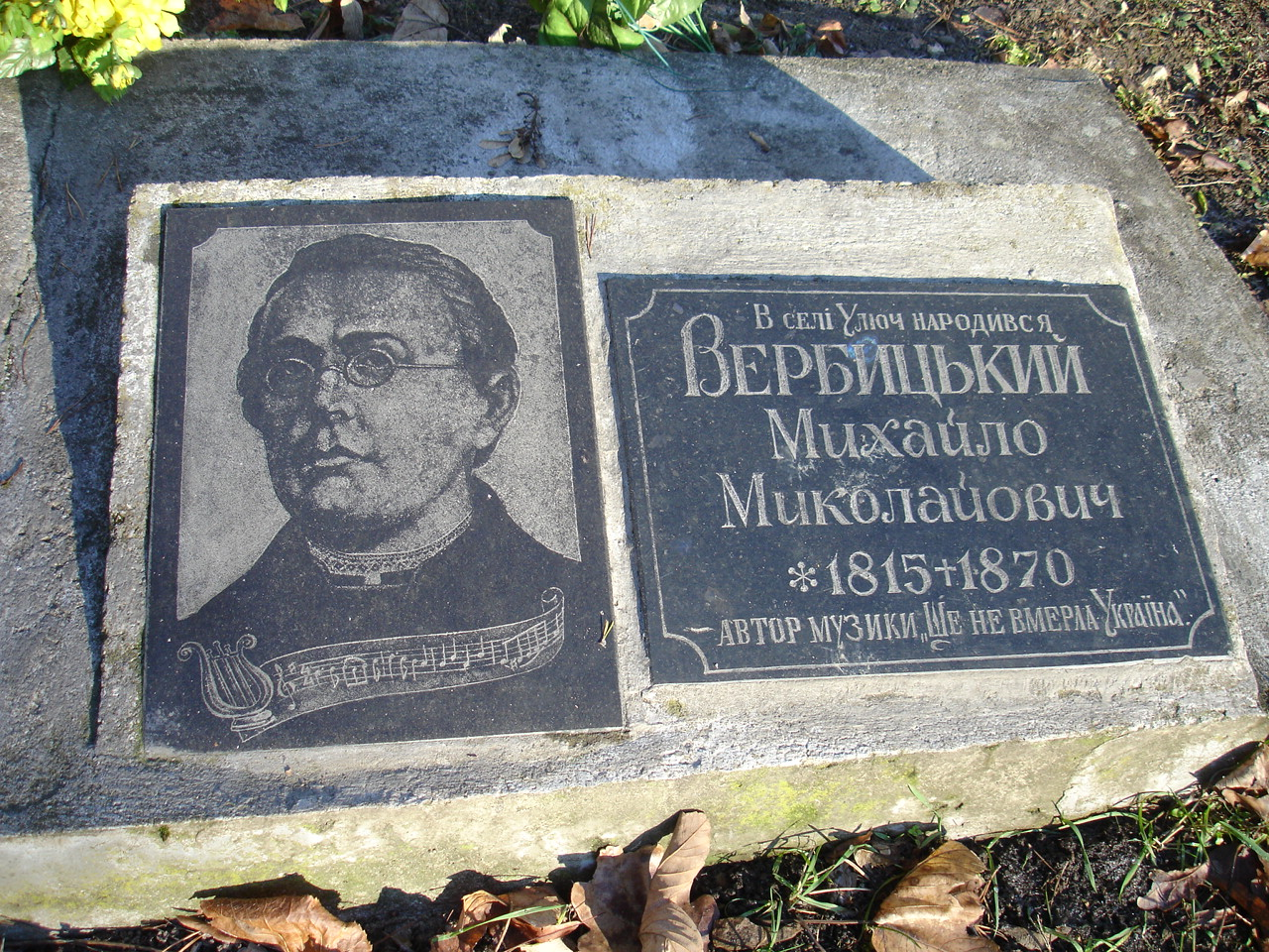 Tablica pamiątkowa Werbickiego w Uluczu